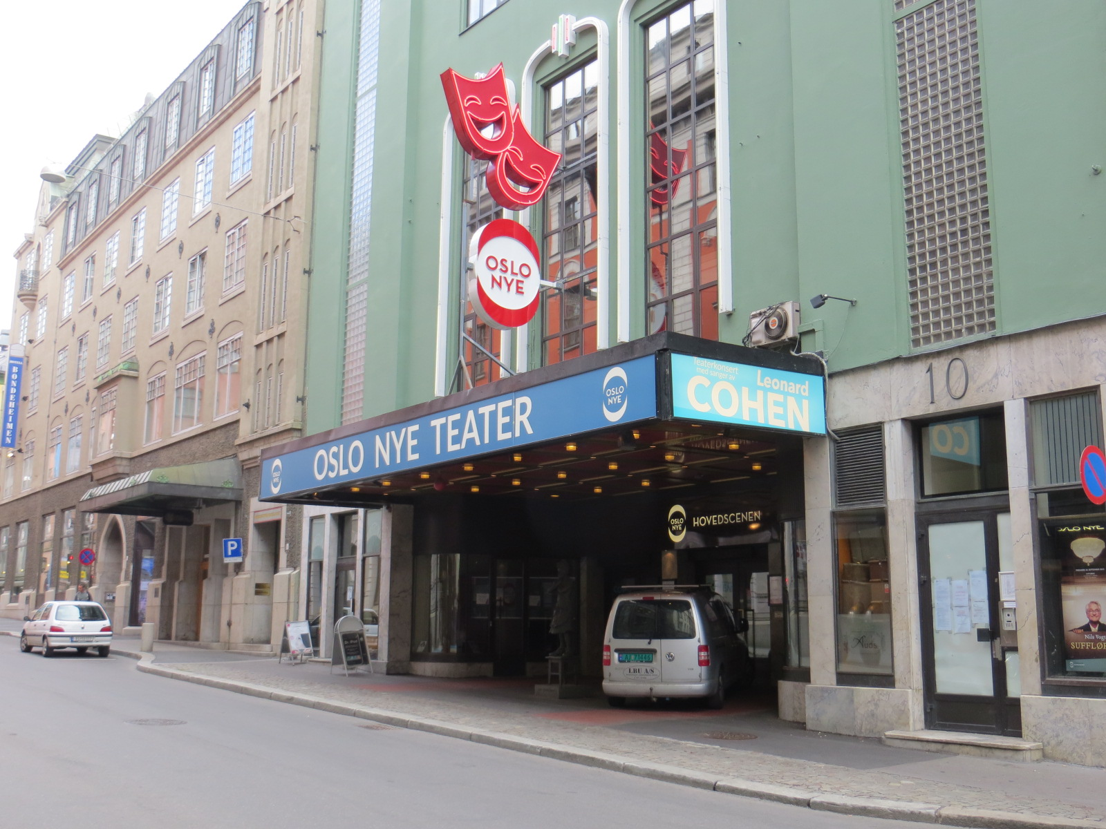 Oslo Nye Teater